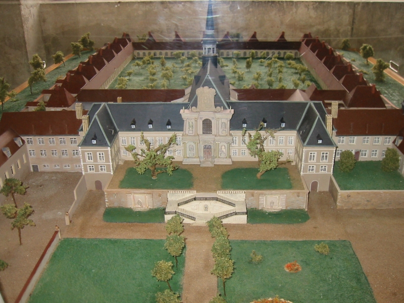 Description: Maquette de la Chartreuse de Bosserville Auteur: Lycée Technique de Bosserville